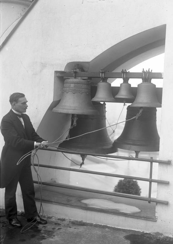 Der Glöckner der russischen Kirche in Berlin! Der russische Glöckner im Glockenstuhl der russischen Kirche in Berlin. Die Glocken sind von russischen Emigranten gestiftet worden.